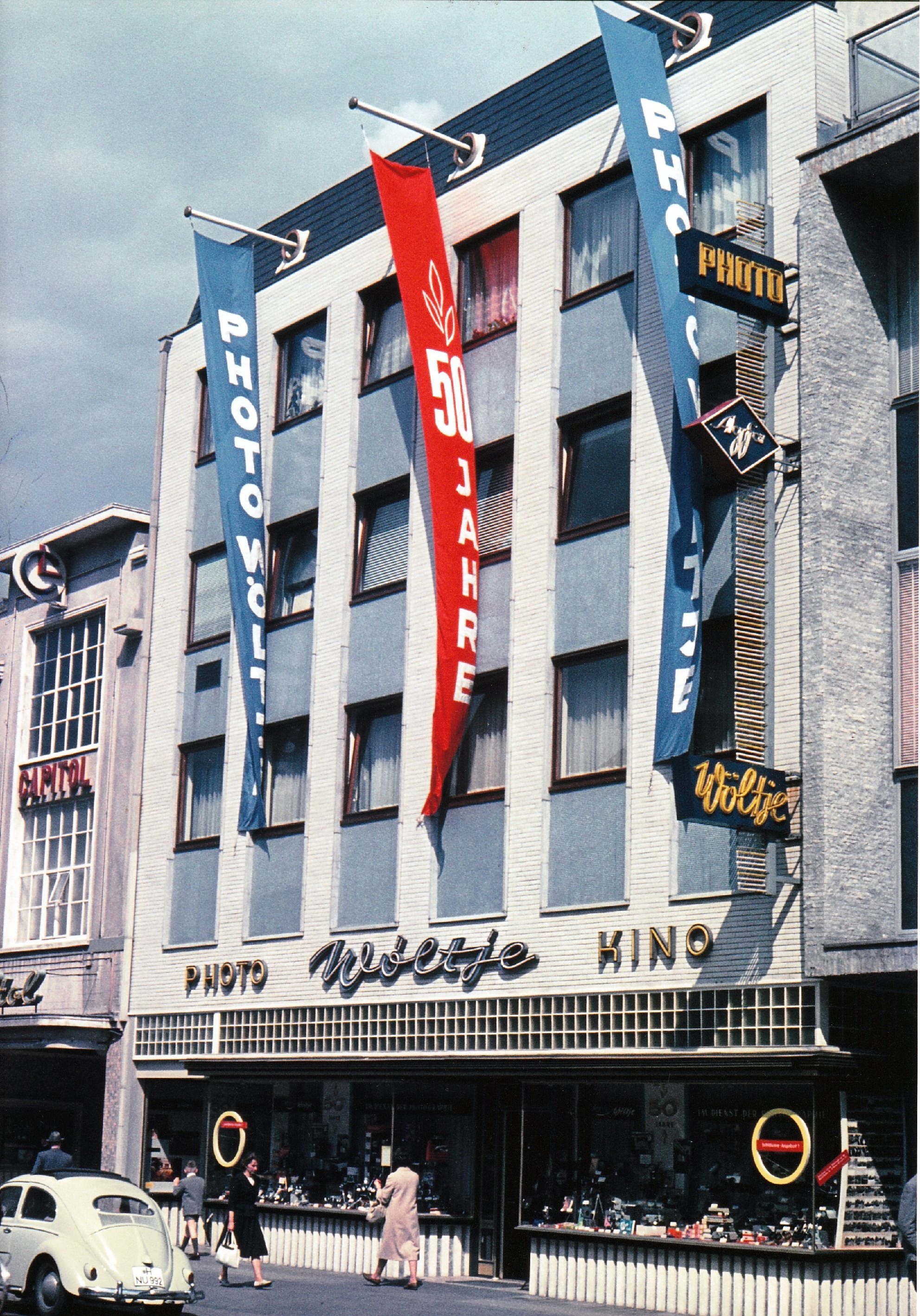 Einführung der Farbfotografie